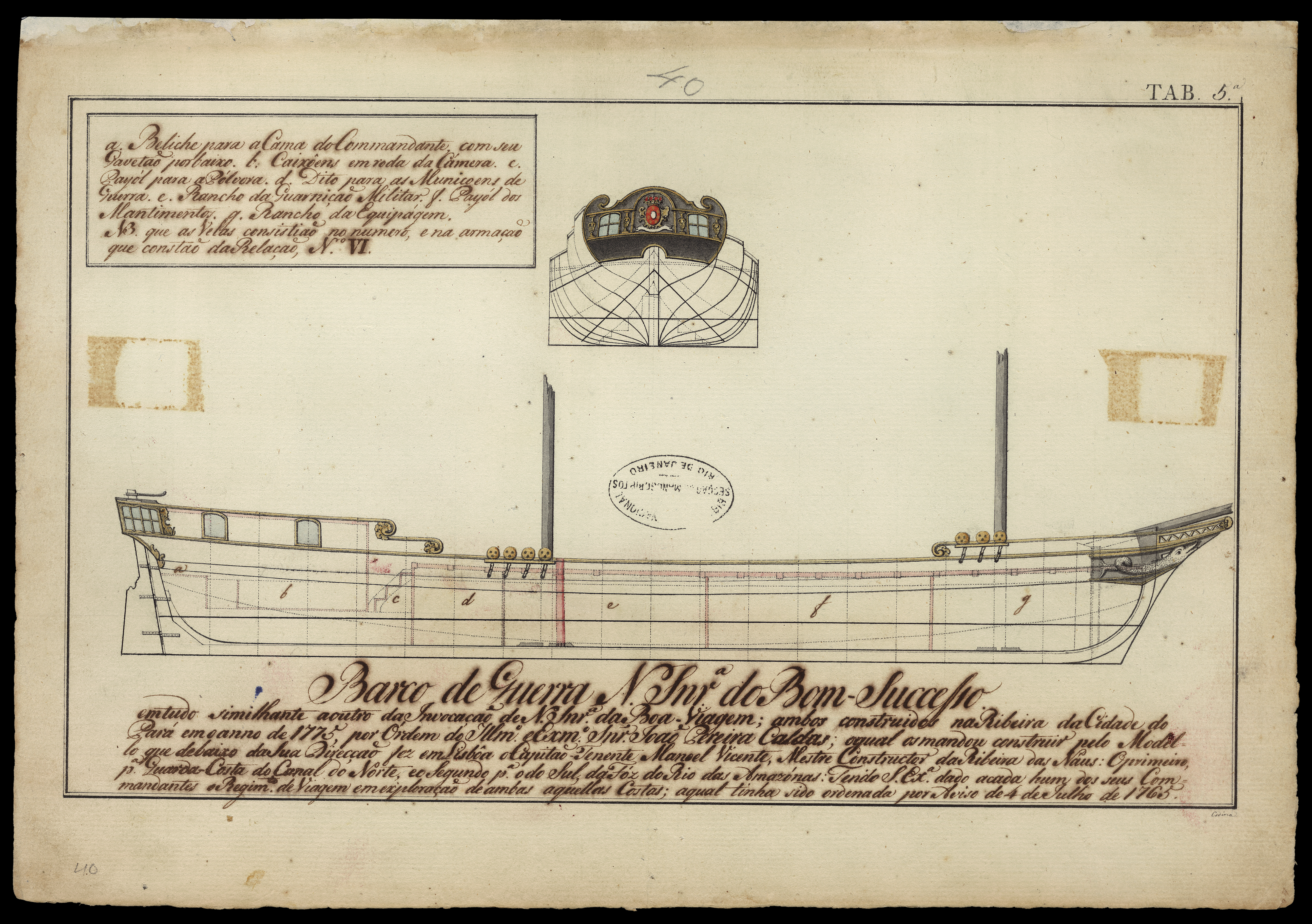 Obra da coleção Brasiliana Iconográfica.